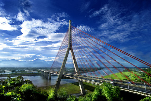 C-27-入選-陳崗賢-斜張橋之美